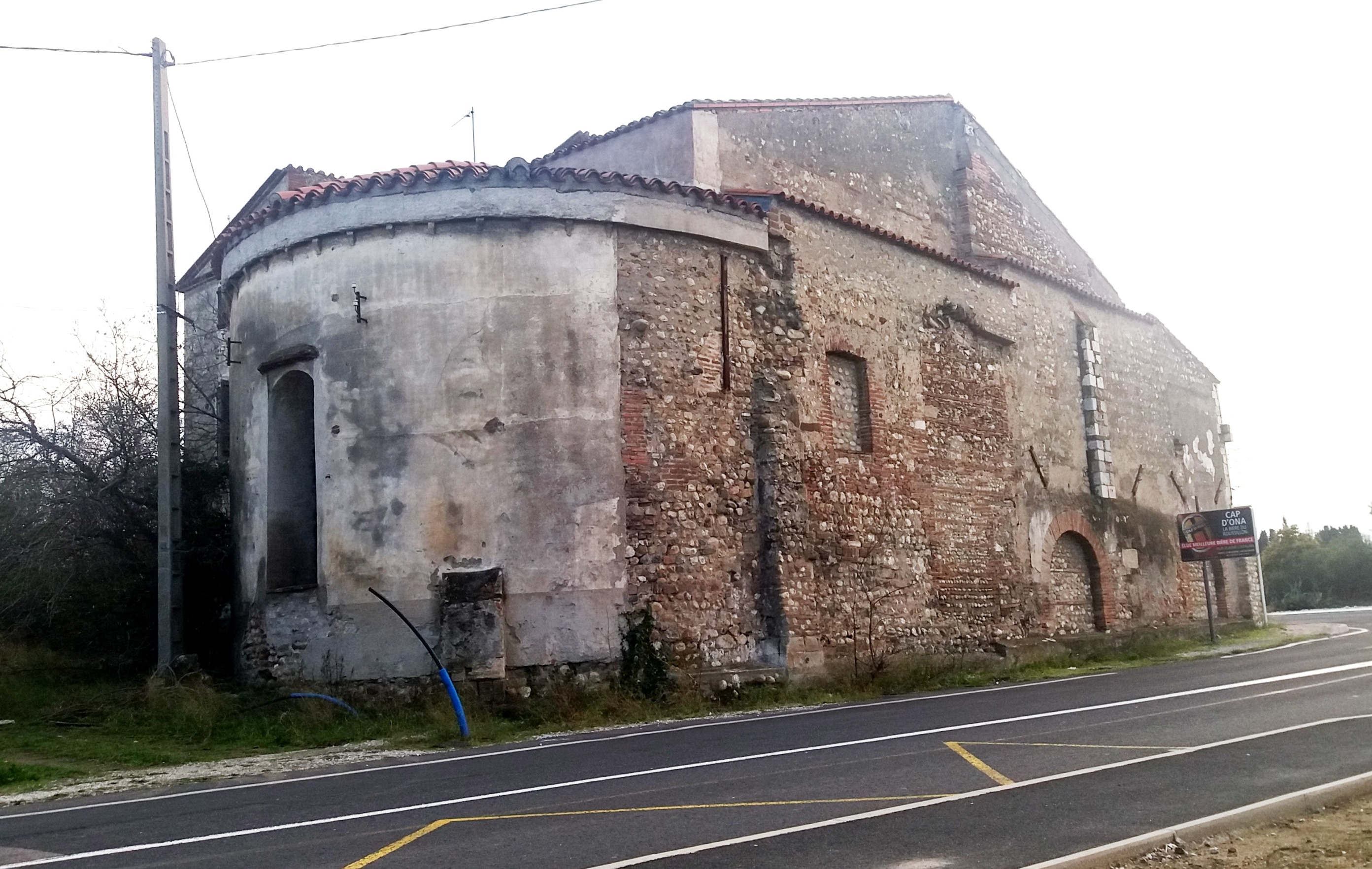 Sant Esteve d'Orla, de Perpinyà